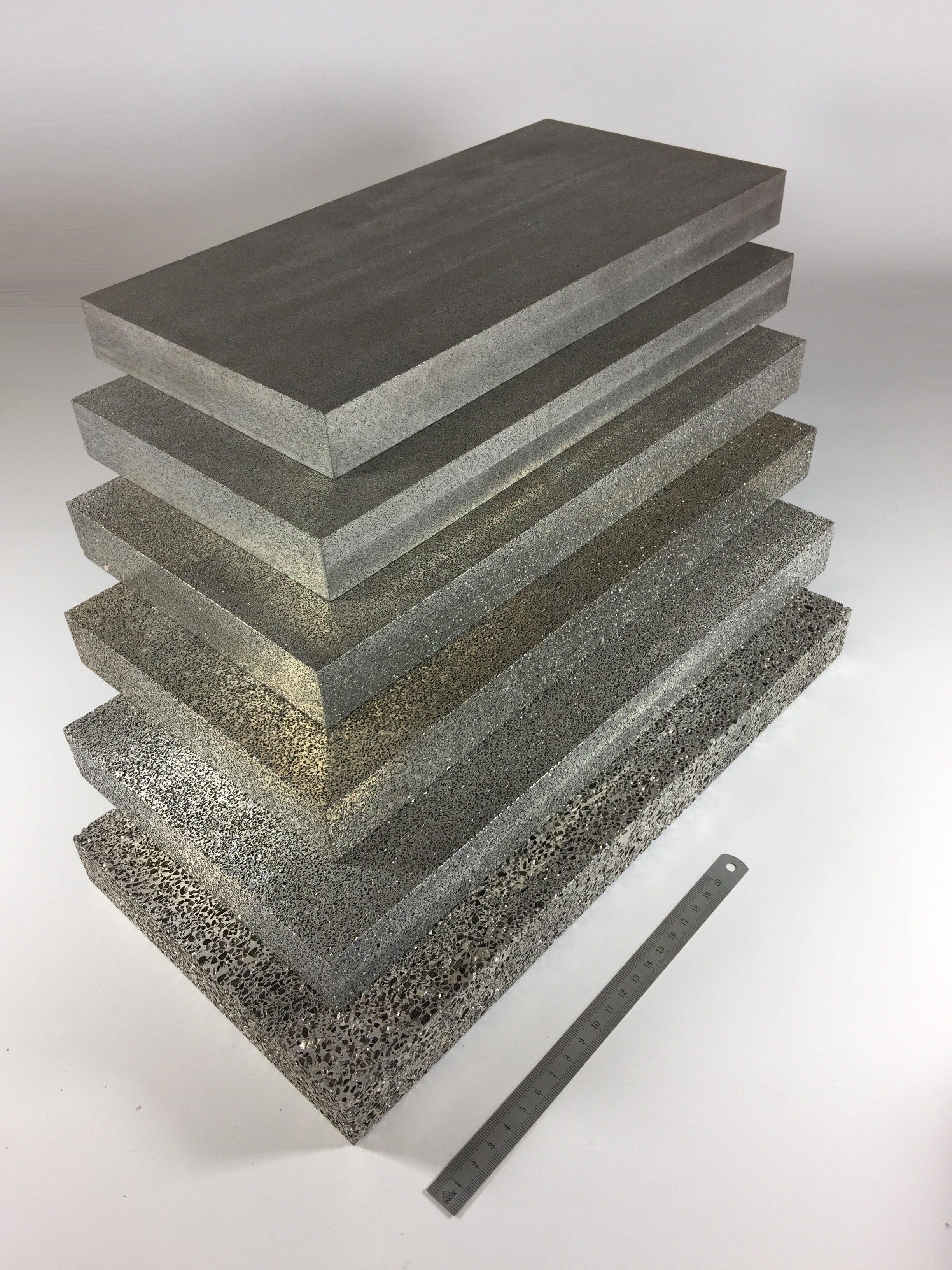 offenporiger Aluminiumschaum (Technologie durch Gießen mit Salz), verschiedene Porengrößen, Schweiz, Exxentis AG